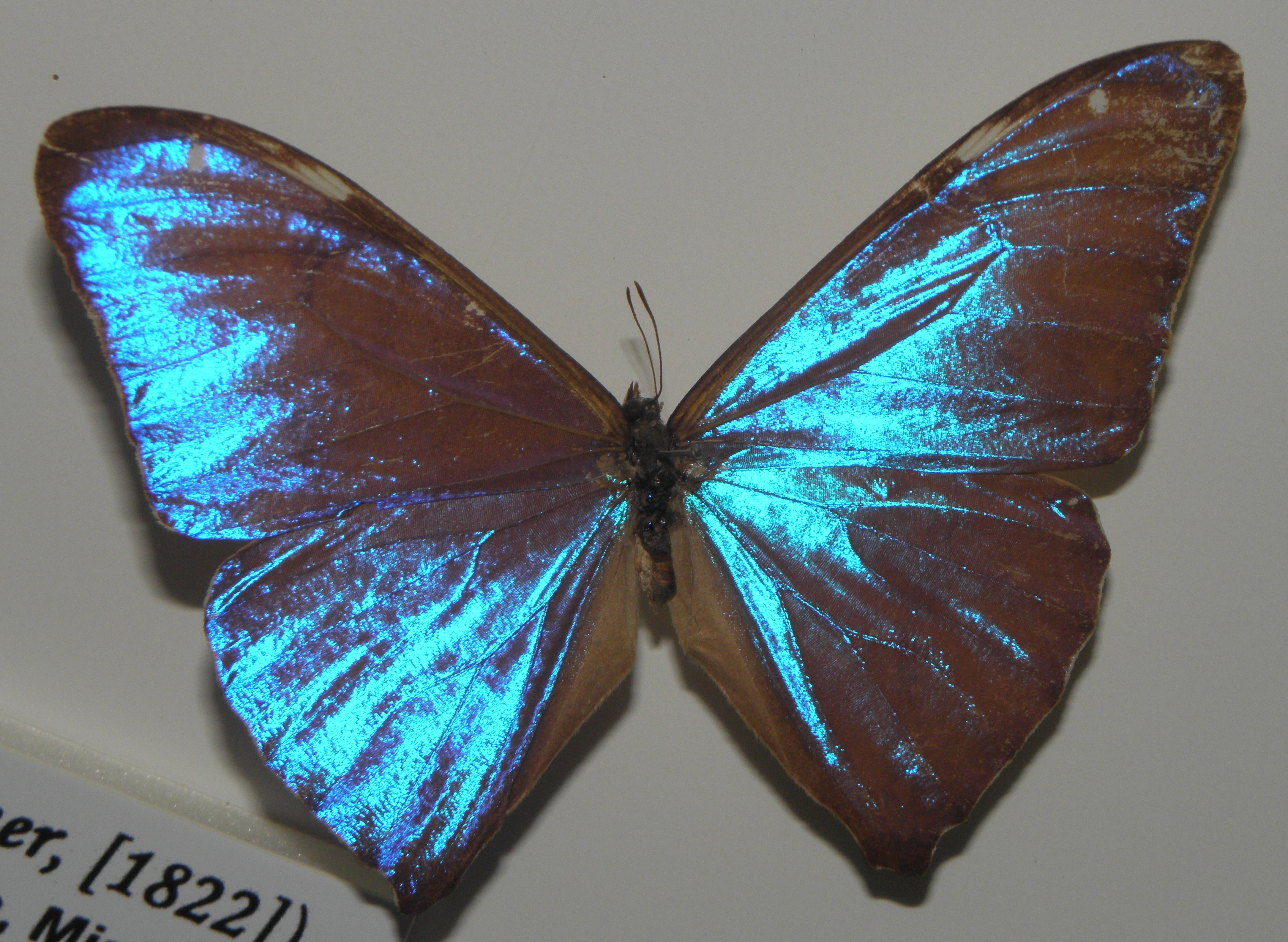 Morpho aega aega